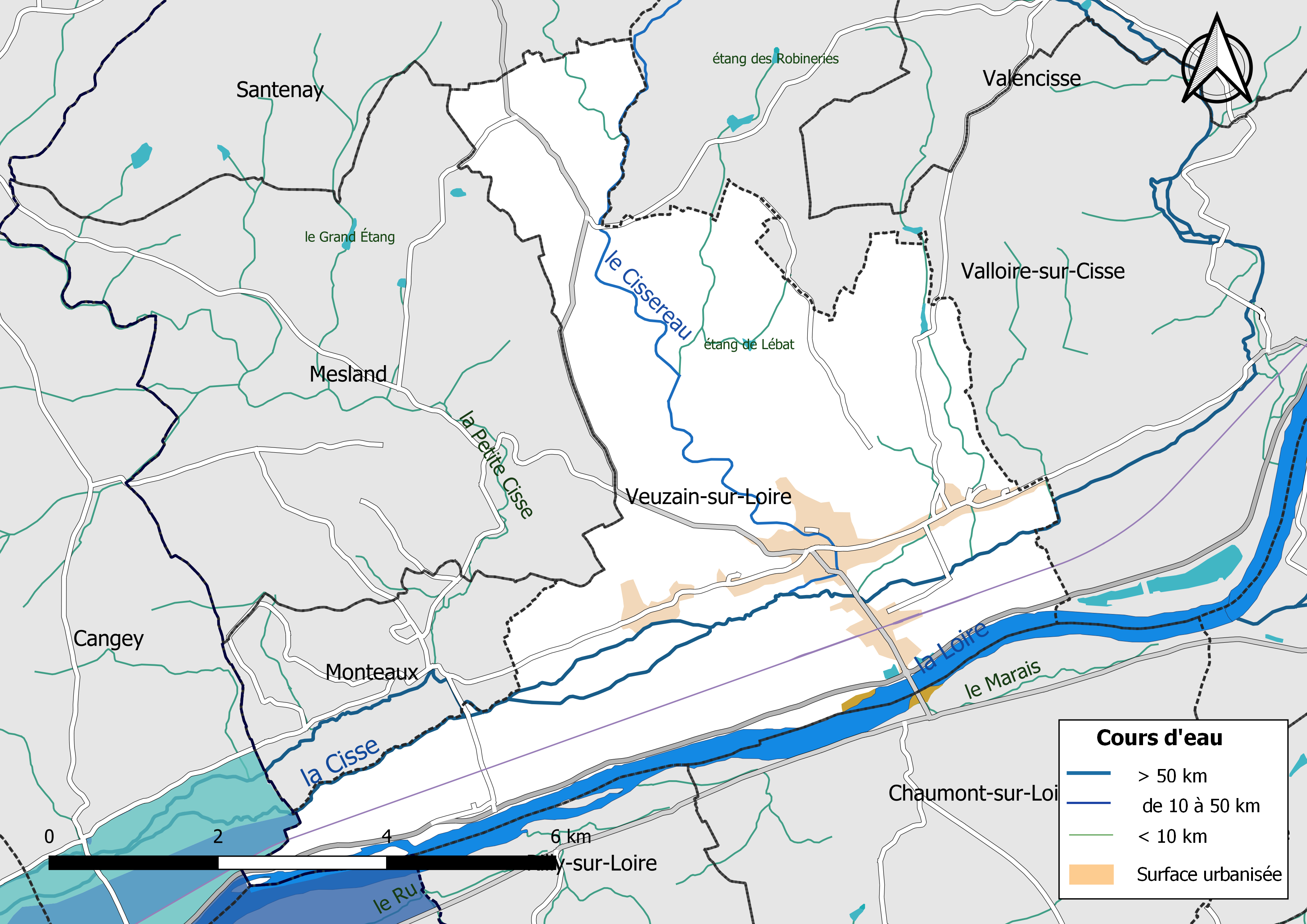 Carte du réseau hydrographique de la commune de Veuzain-sur-Loire (Loir-et-Cher, France).